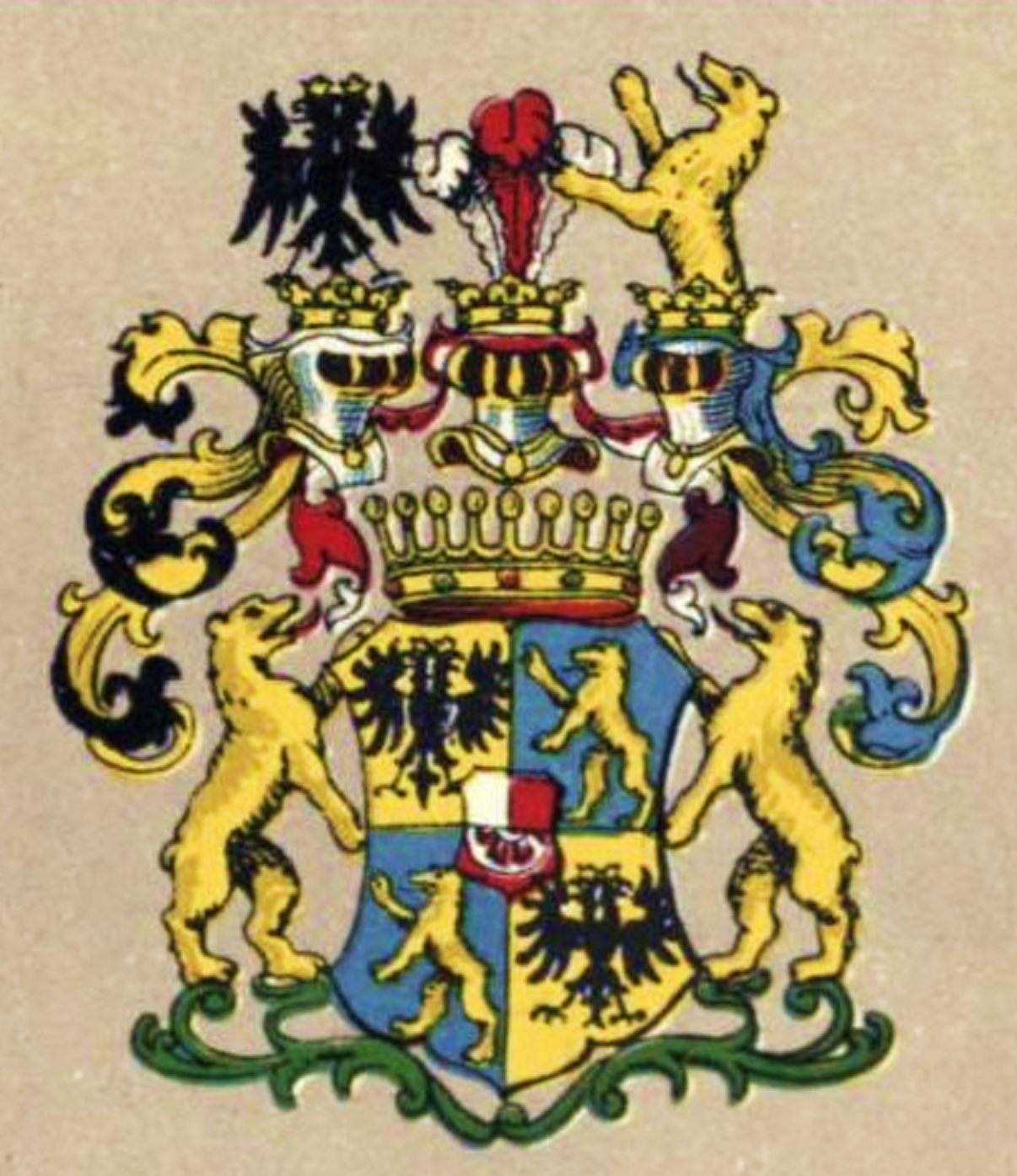 Wappen der Grafen Chotek de Chotkova et Vognin (Chotek von Chotkova und Wognin)